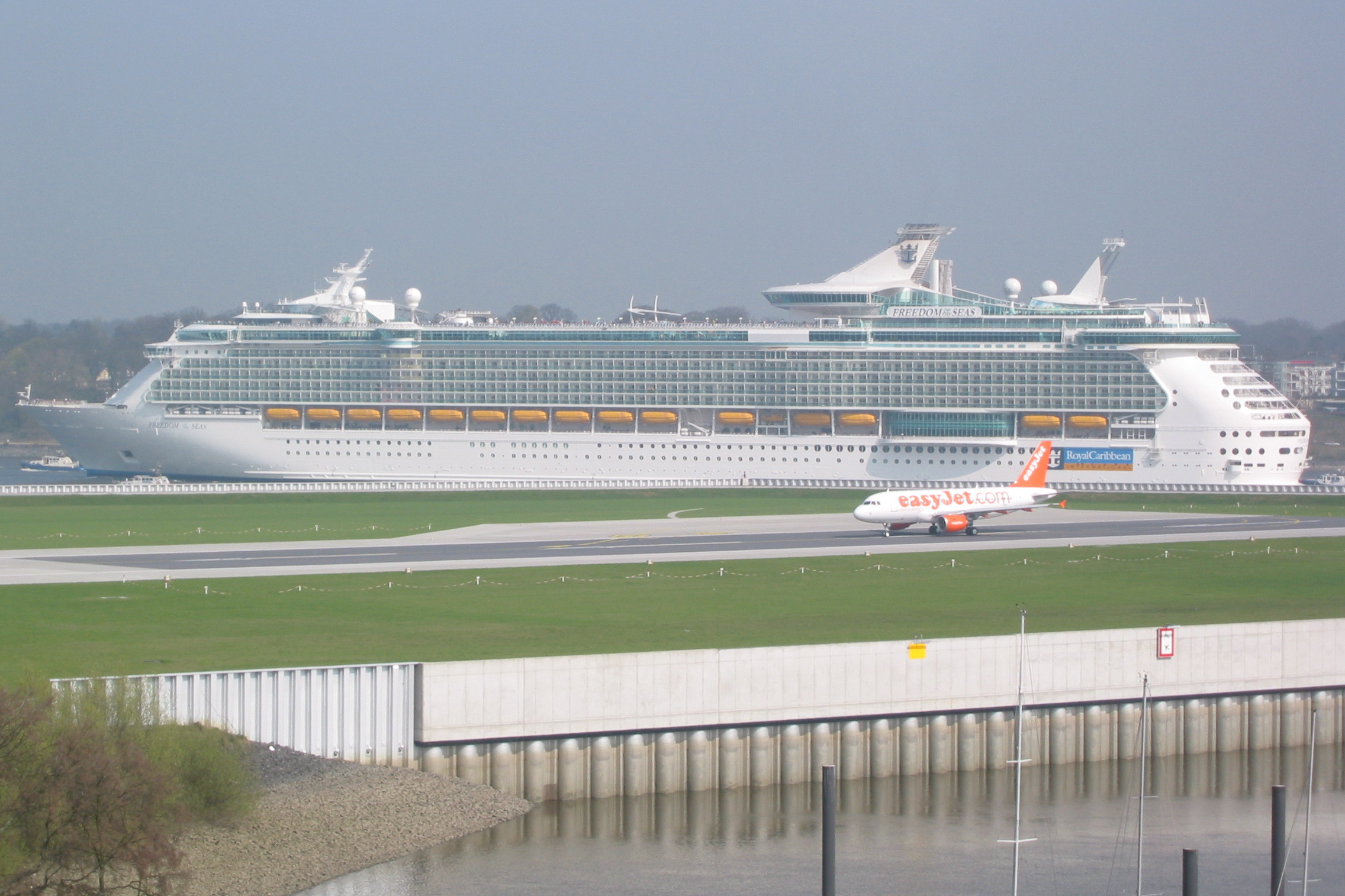 Die Freedom of the Seas passiert die Landebahn des Airbus-Werkes in Hamburg-Finkenwerder